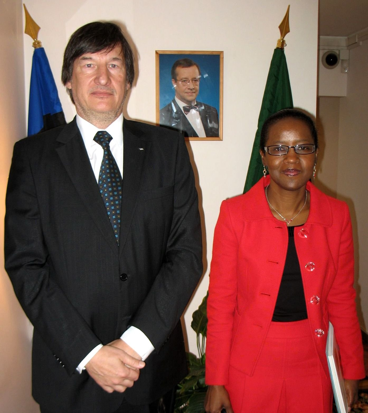 Lisbon 20.05.2009 Ambassador of São Tomé and Príncipe in Portugal Alda Alves de Melo dos Santos and Estonian Ambassador in Portugal Mart Tarmak